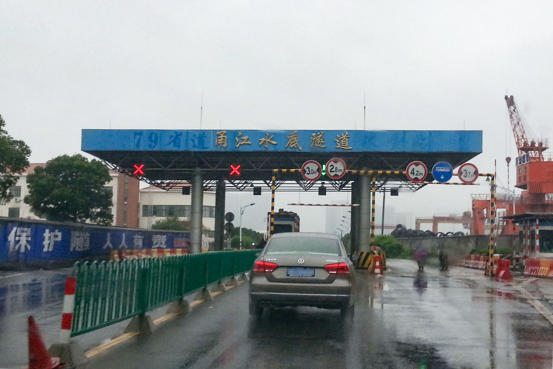 320省道甬江水底隧道